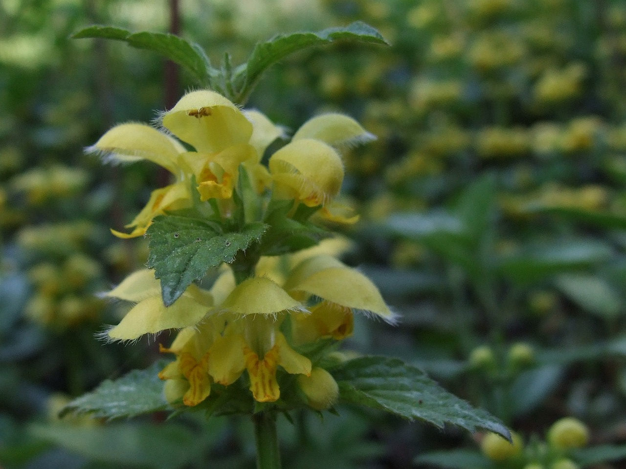 Galeobdolon luteum